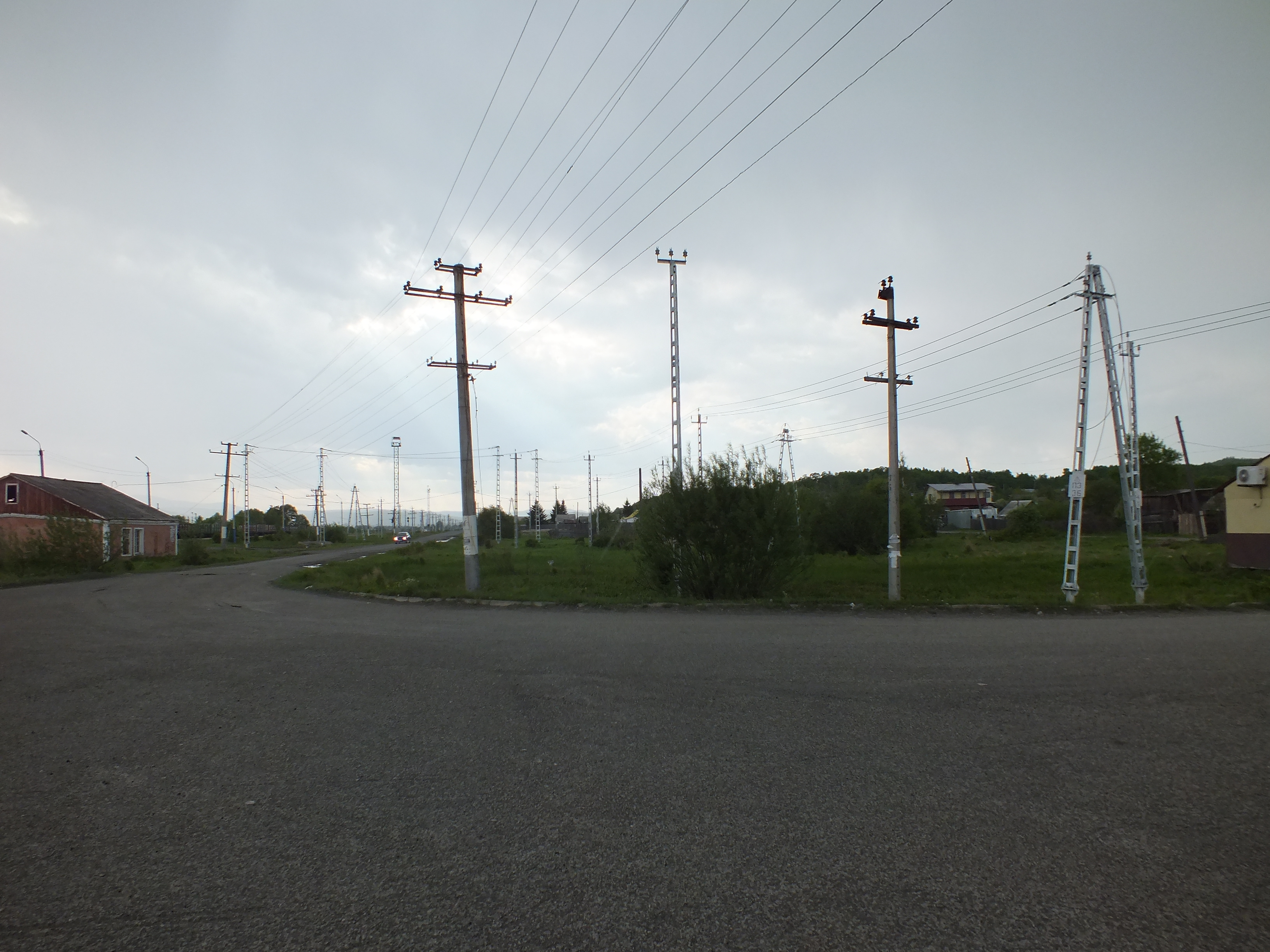 Станция Мылки ДВЖД